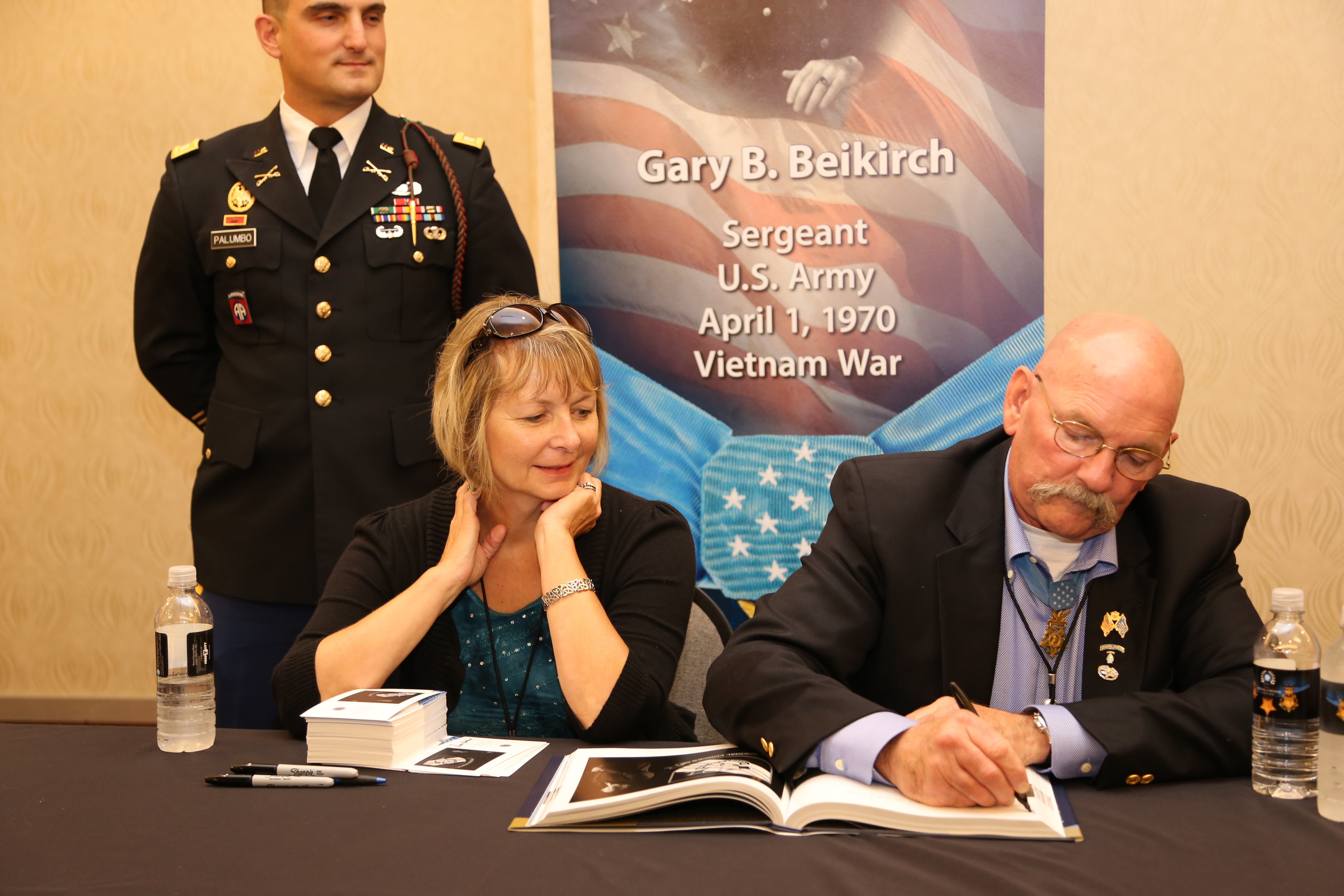 Recipient Gary Beikirch.